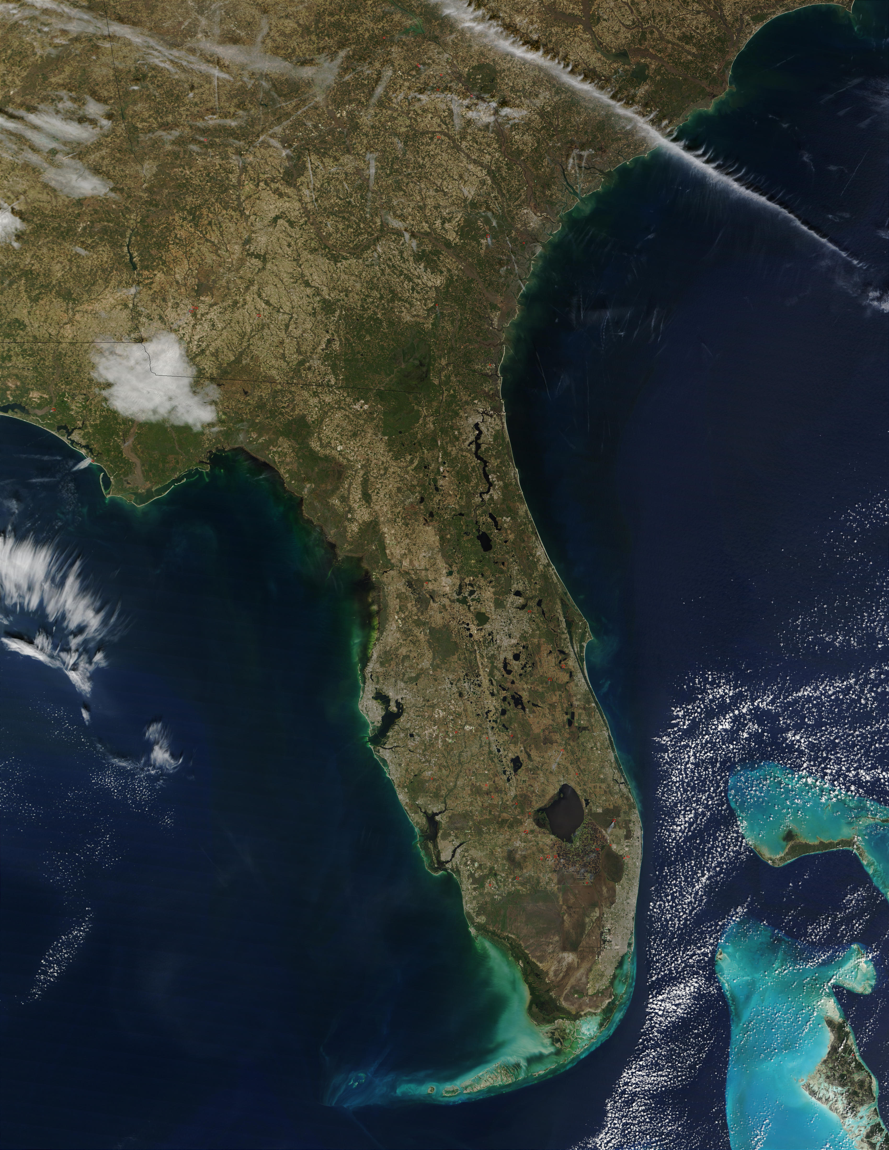 Vue satellite de la Floride